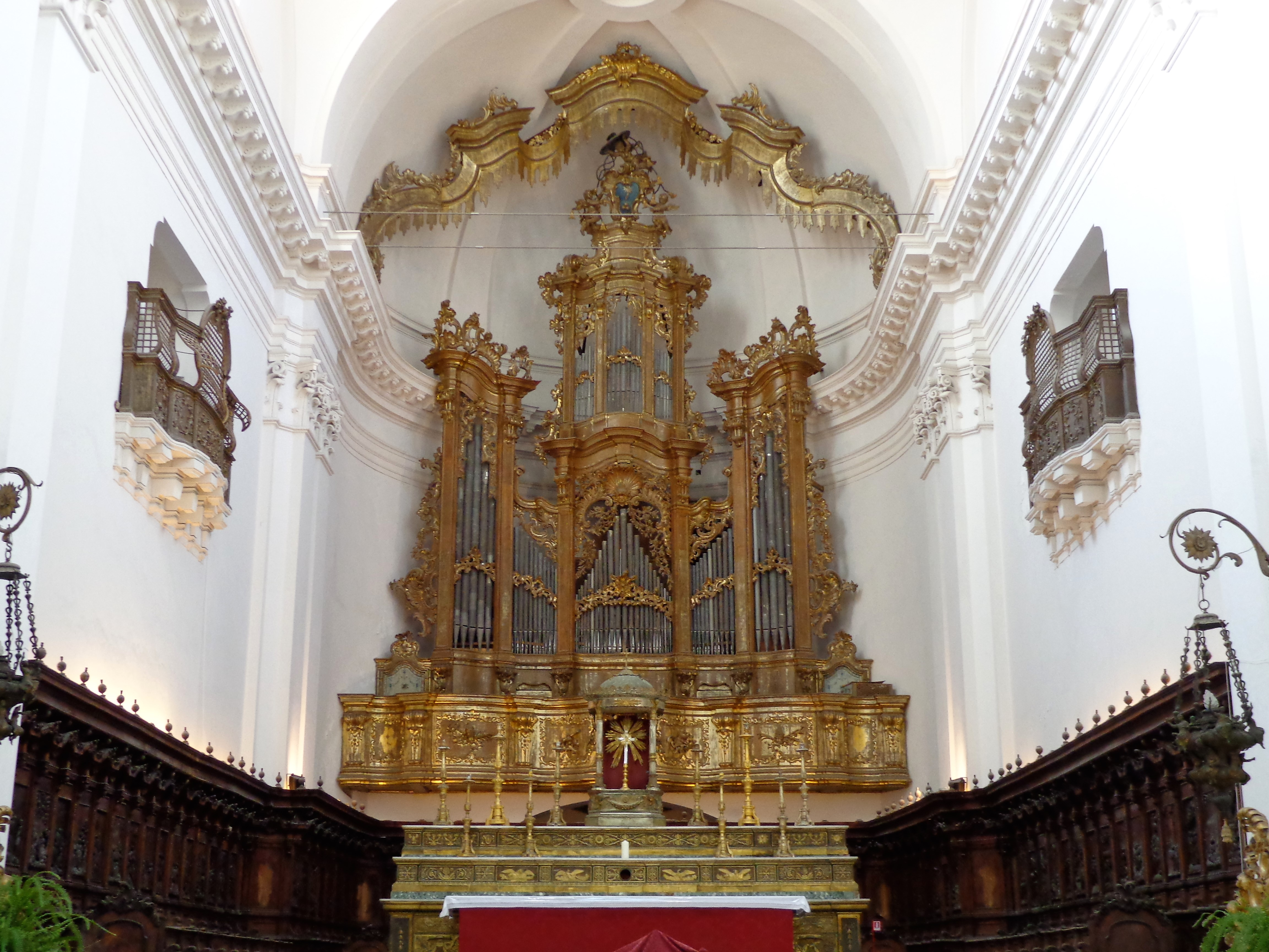 Altare maggiore e organo.